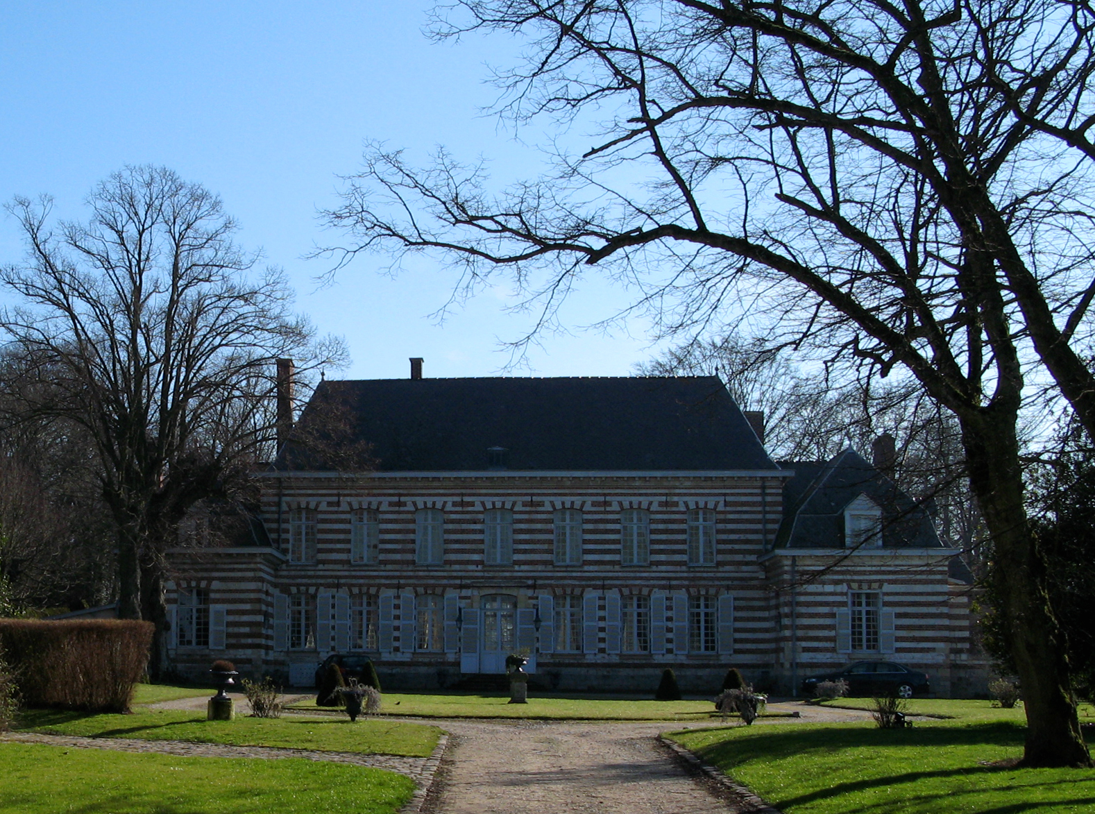 Saint-Fuscien (Somme, France) - Le château. .